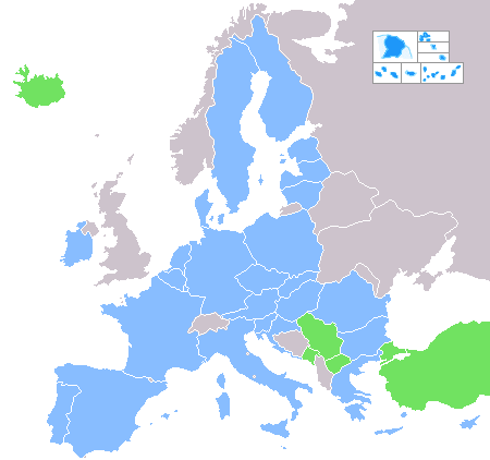 Eŭropa Unio laŭ stato de februaro 2020